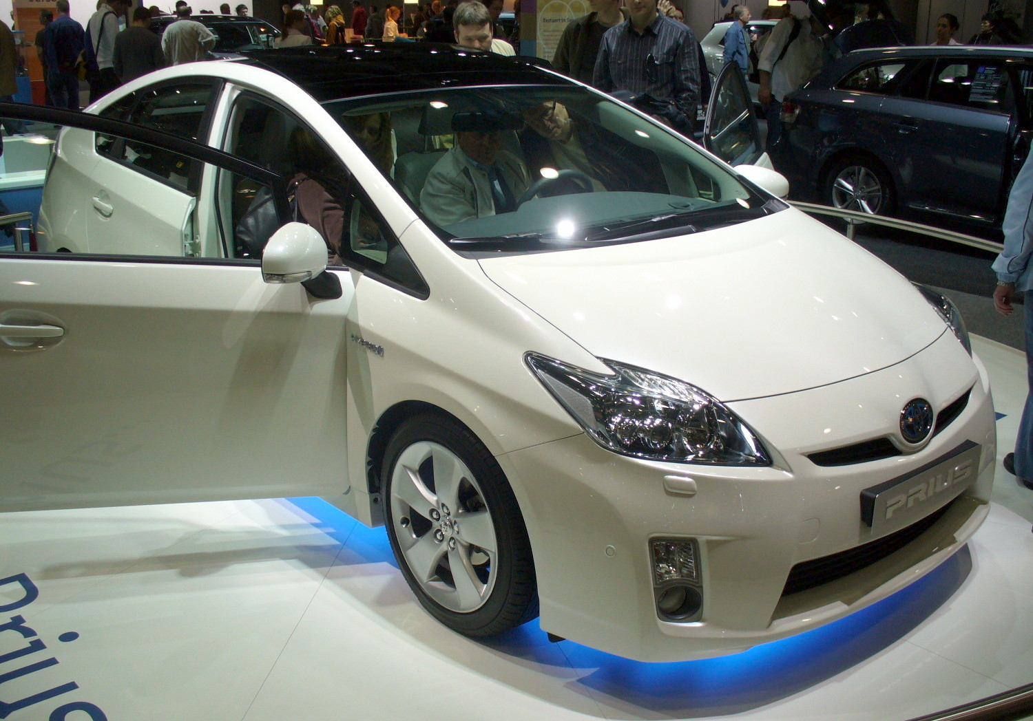 Toyoa Prius III